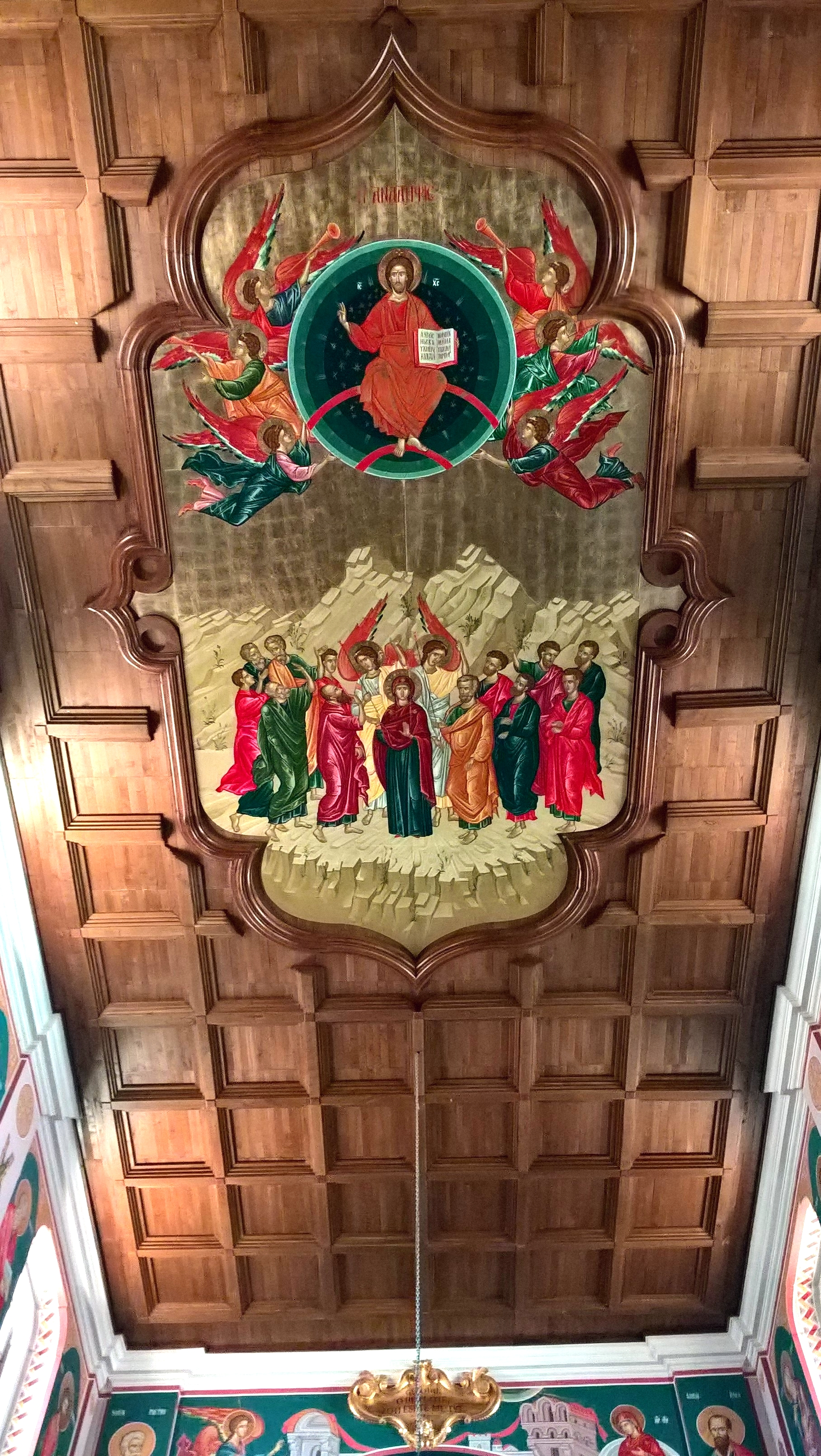 The central vault of the church nave; Byzantine painting